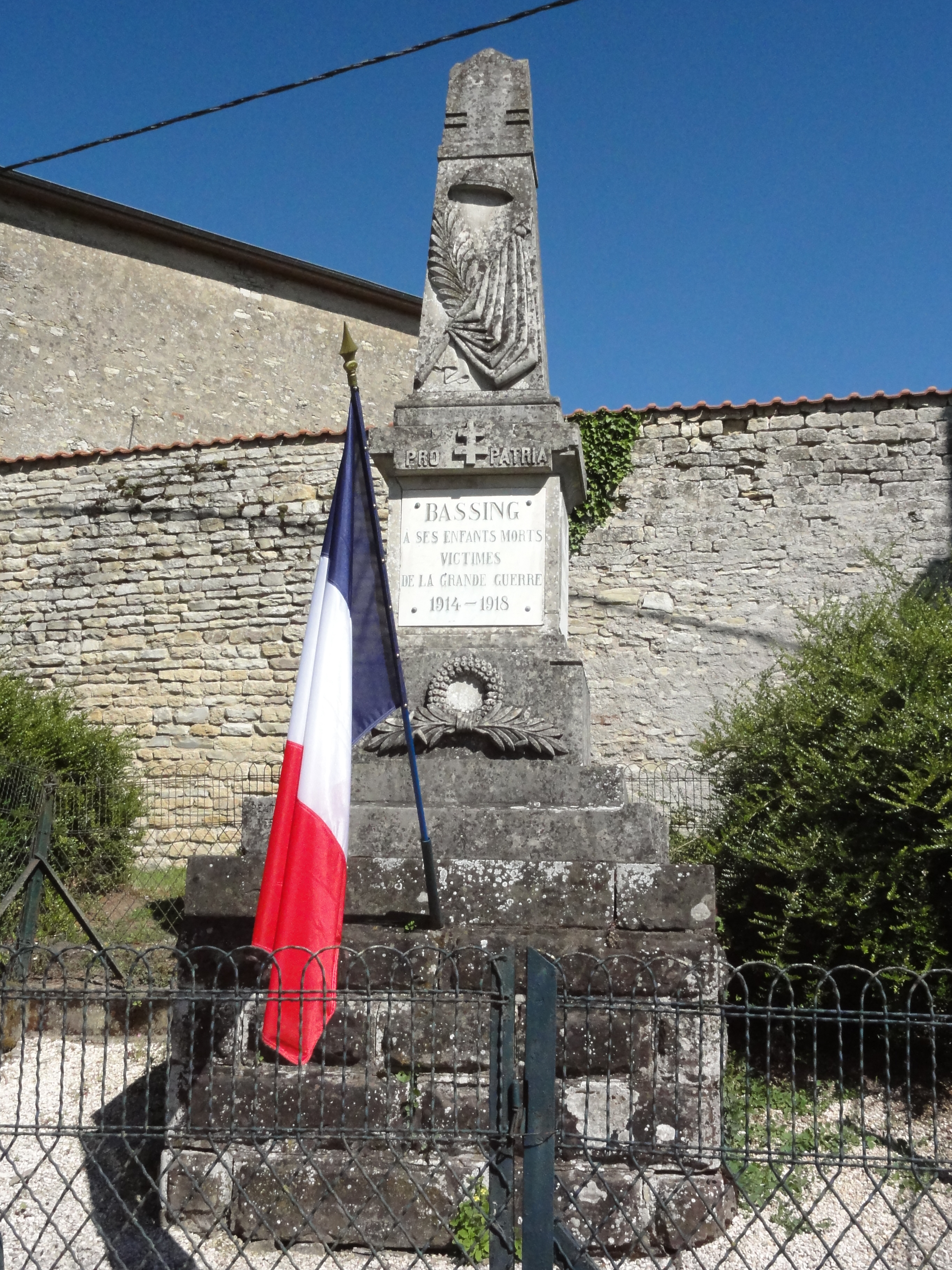 Bassing (Moselle) monument aux morts